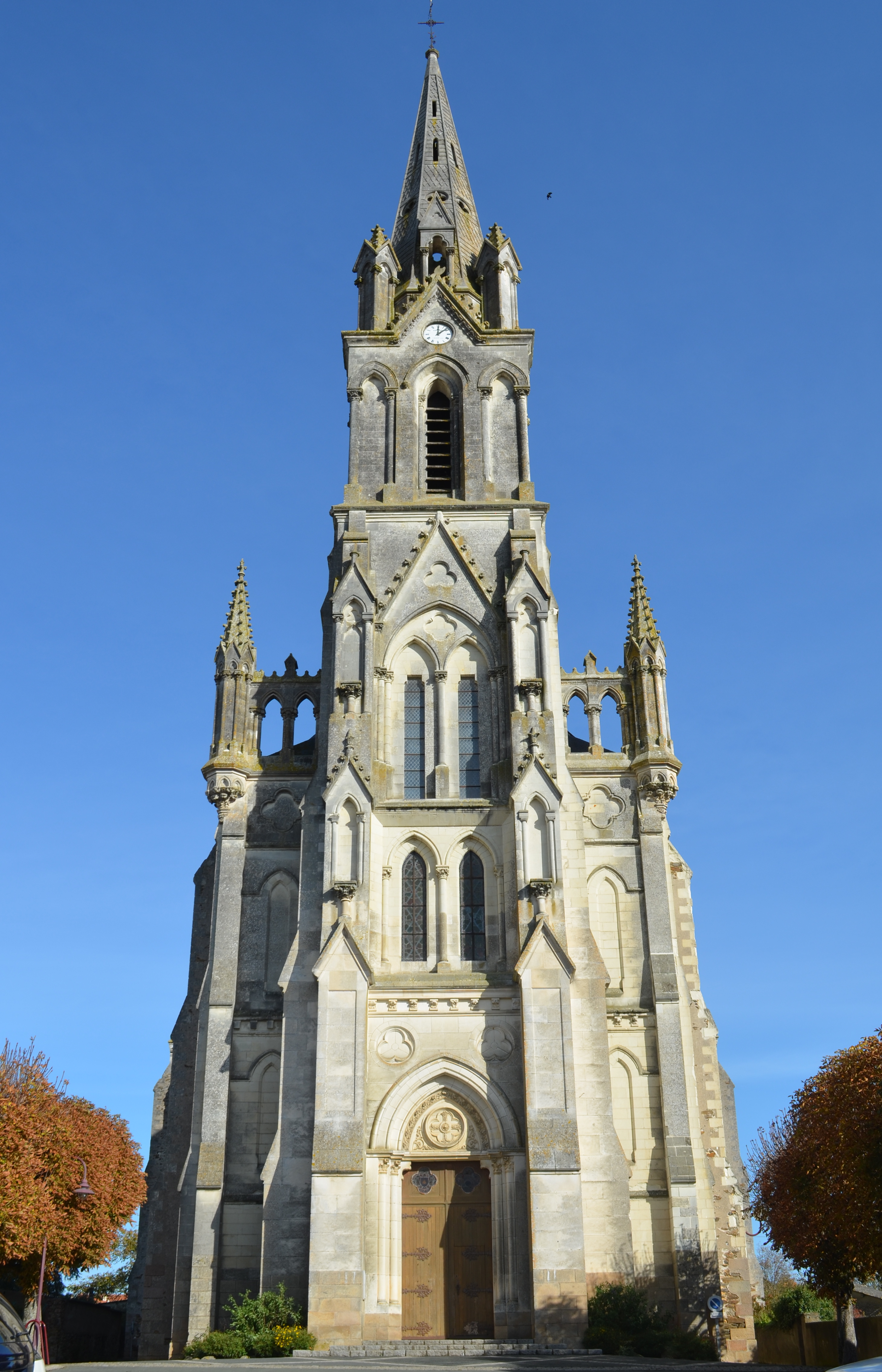 Eglise de Jallais (Maine-et-Loire)